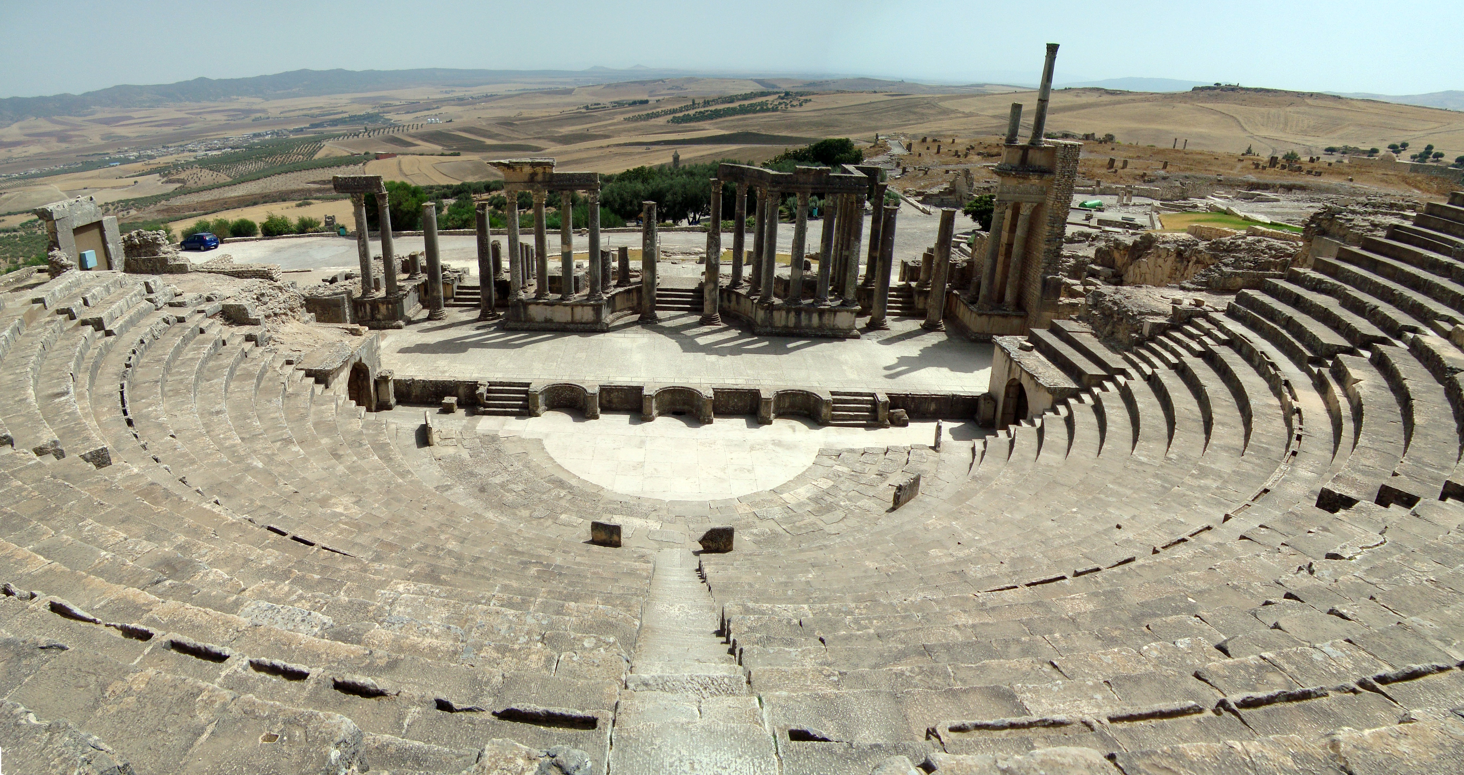 Théâtre